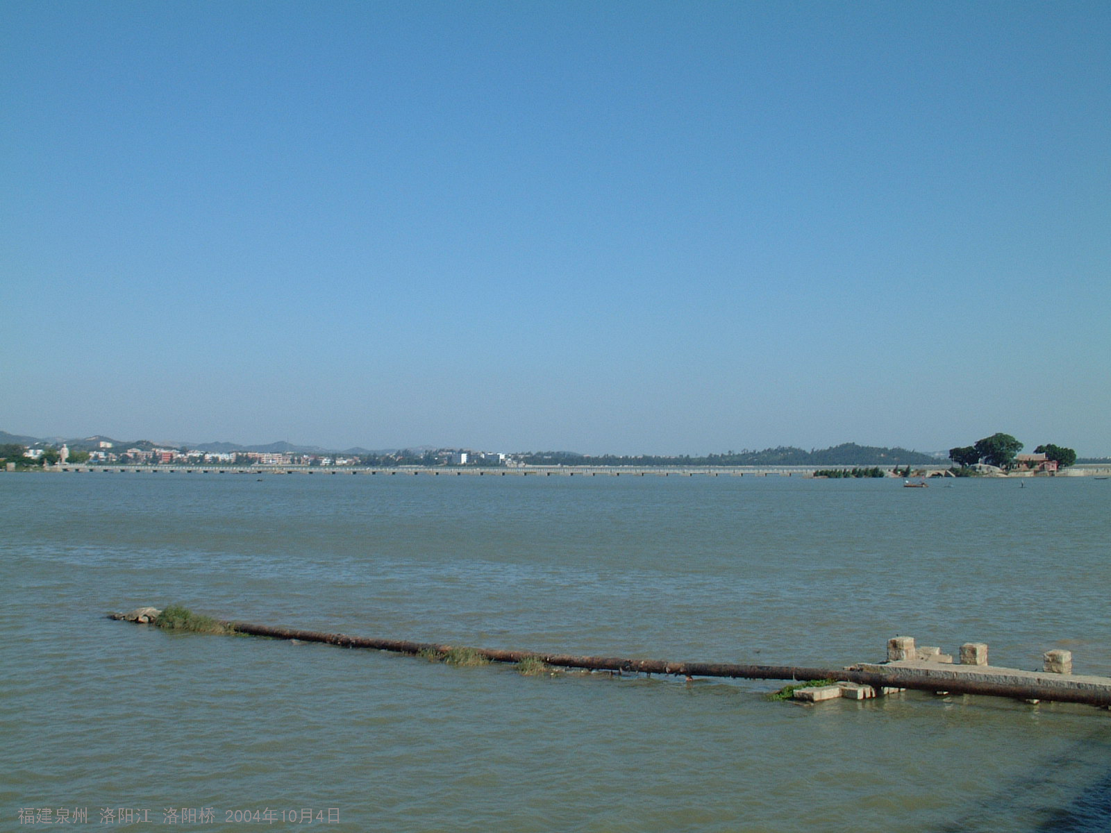 洛阳桥 luo yang qiao